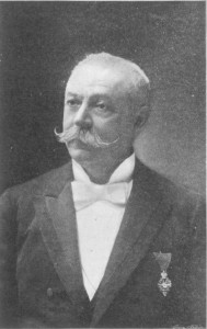 Alois Elhenický